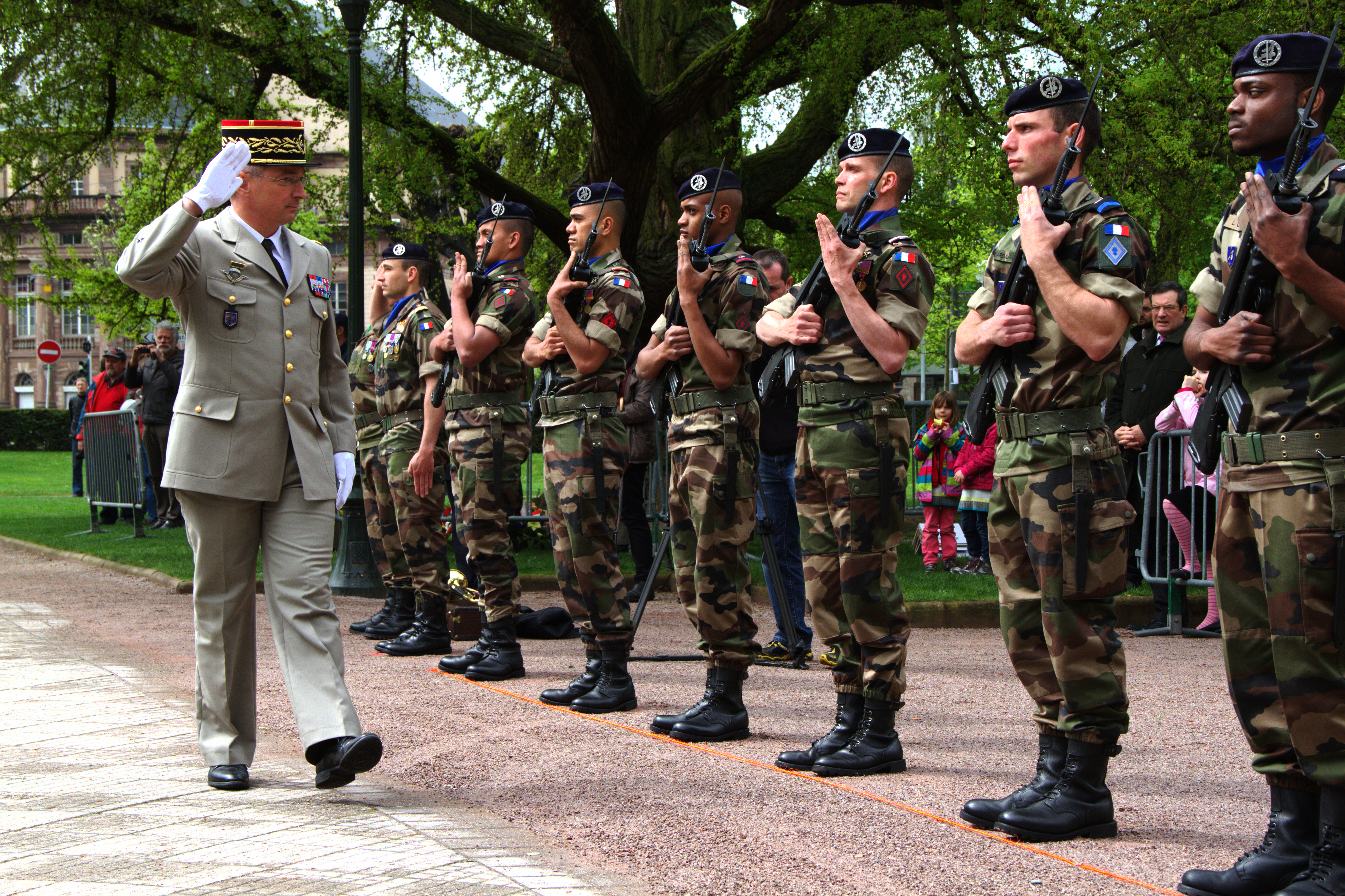 Strasbourg 28 avril 2013 commémoration journée du souvenir de la déportation. Le général Éric Hautecloque-Raysz, gouverneur militaire de Strasbourg passe en revue le détachement de l’Eurocorprs.